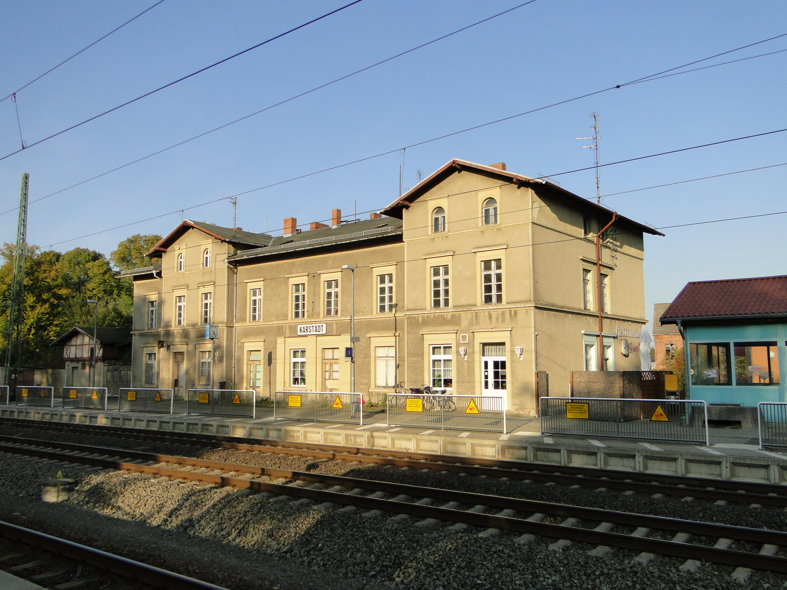 Bahnhof - Karstädt, Prignitz